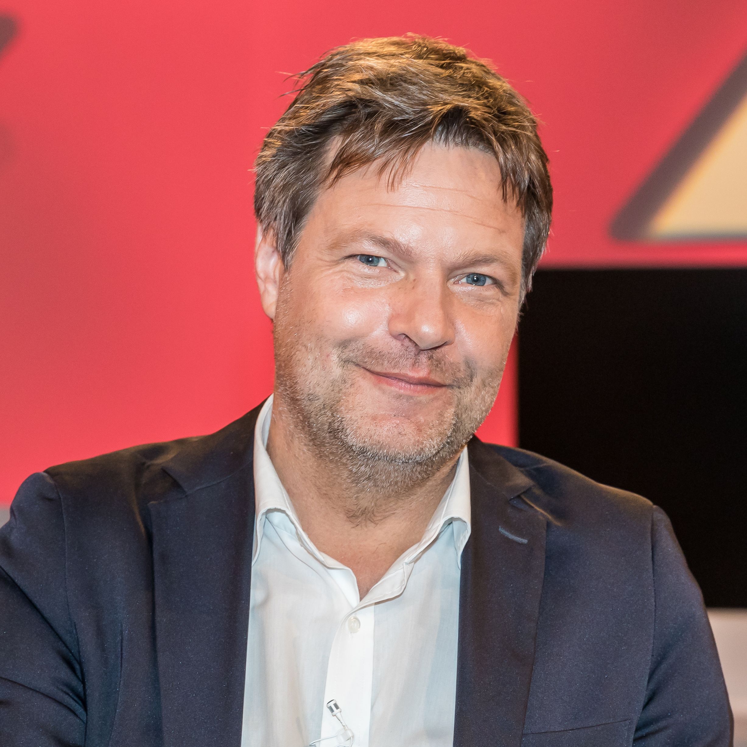 MAISCHBERGER am 20. Juni 2018 in Köln. Produziert vom WDR. Thema der Sendung: „Merkel gegen Seehofer: Endspiel für die Kanzlerin?“ Foto: Robert Habeck (Bündnis 90/Grüne, Parteichef)